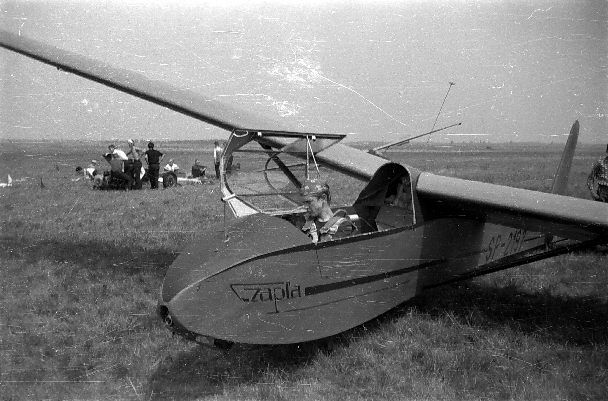 Szkolenie szybowcowe kandydatów do WOSL Dęblin na lotnisku wojskowym Mierzęcice (dzisiaj port lotniczy Pyrzowice) w lipcu 1961 roku.